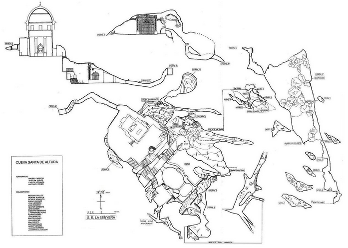 Topografía de la Cueva Santa realizado por los espeleólogos La Senyera